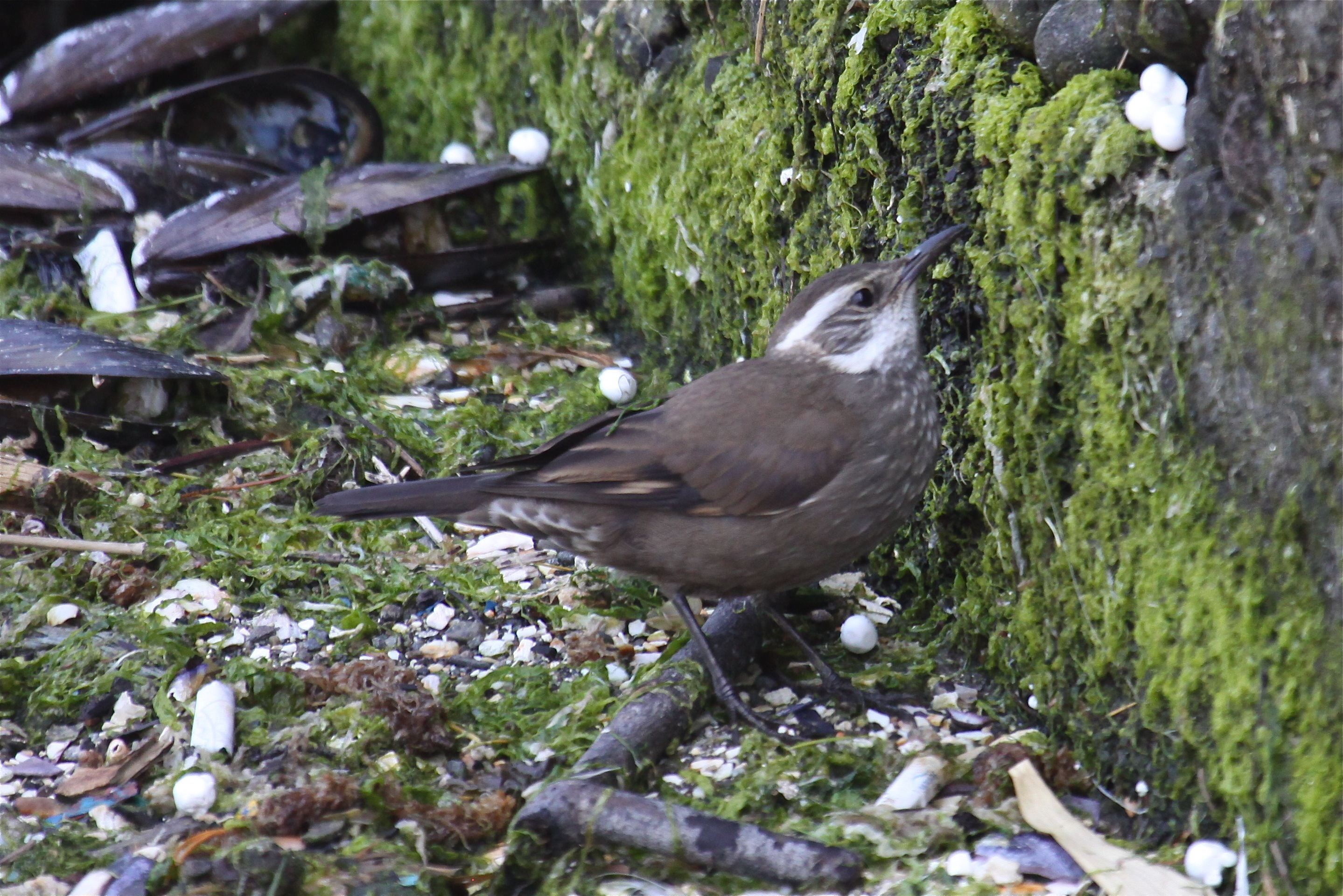 Cinclodes patagonicus, Puerto Montt, Chile